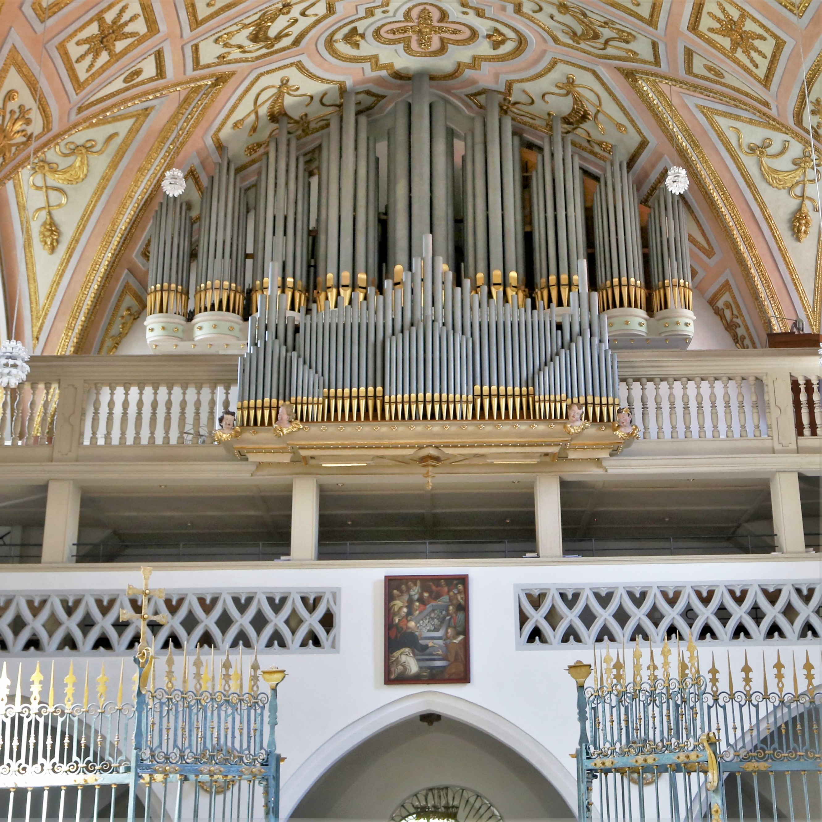 Aribonenstraße 9, München; Katholische Pfarrkirche St. Maria Ramersdorf, Wallfahrtskirche des 15. Jahrhunderts, Wandpfeilerkirche mit eingezogenem Chor, 1675 barockisiert, gotischer Turm mit barockem Helm; mit Ausstattung.